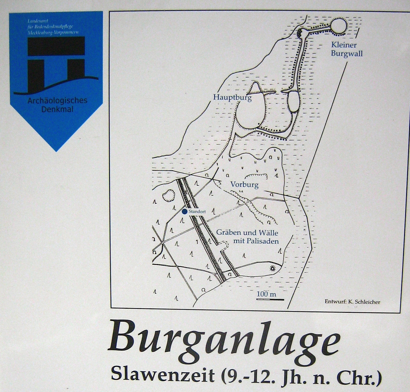 Slawischer Burgwall Hühnerwinkel, bei Plöwen (Landkreis Ucker-Randow in Vorpommern). Im Bild: Detail einer Infotafel mit dem Lageplan des Burgwalles.